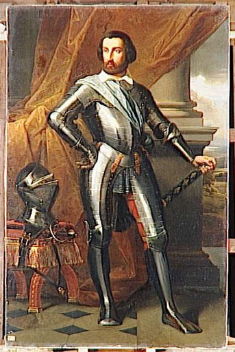 Copie d'après un original conservé au château de Beauregard ; commandé par Louis-Philippe pour le musée historique de Versailles en 1834